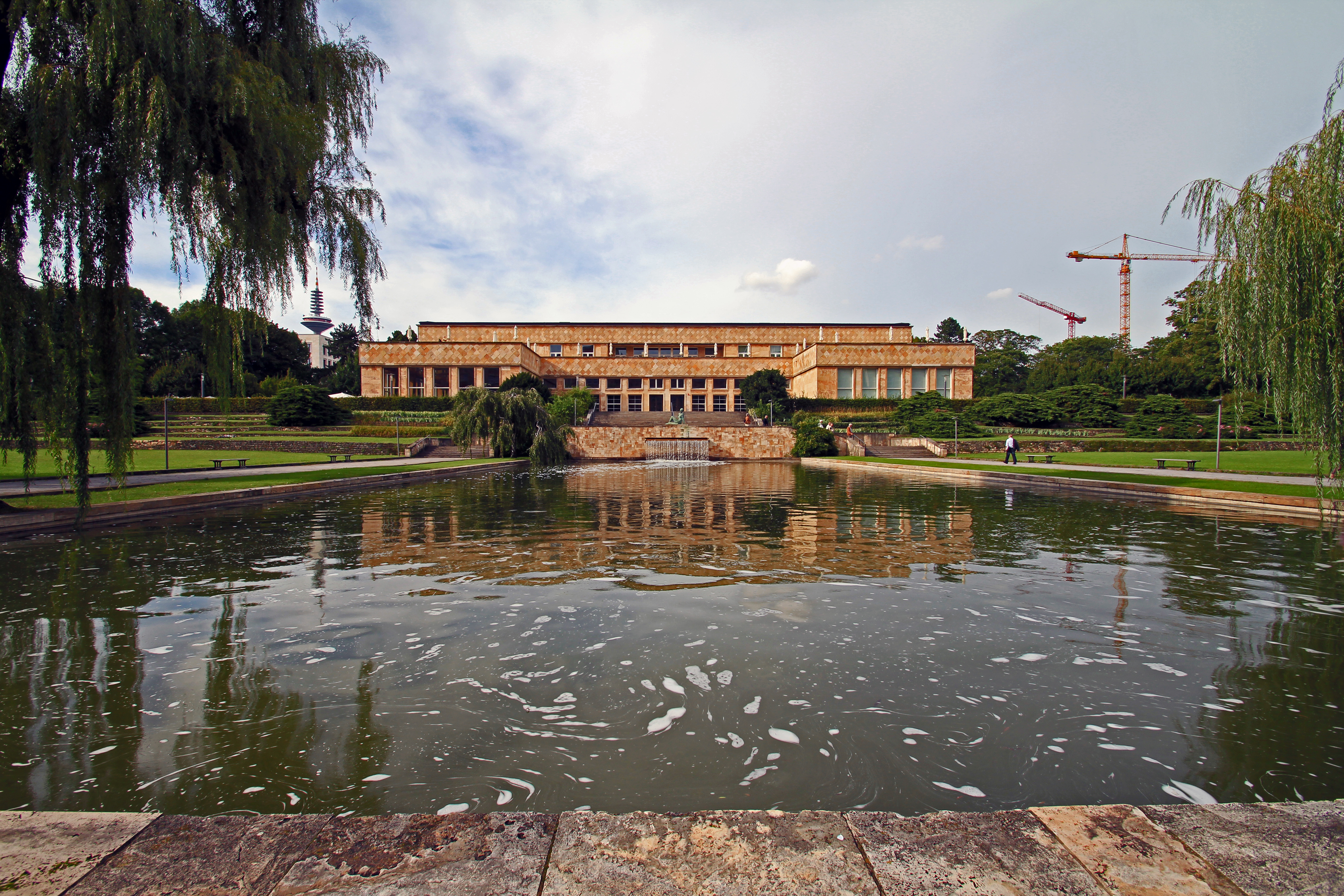 Kasino des IG-Farben-Hauses von der Rückseite des Hauptgebäudes aus.